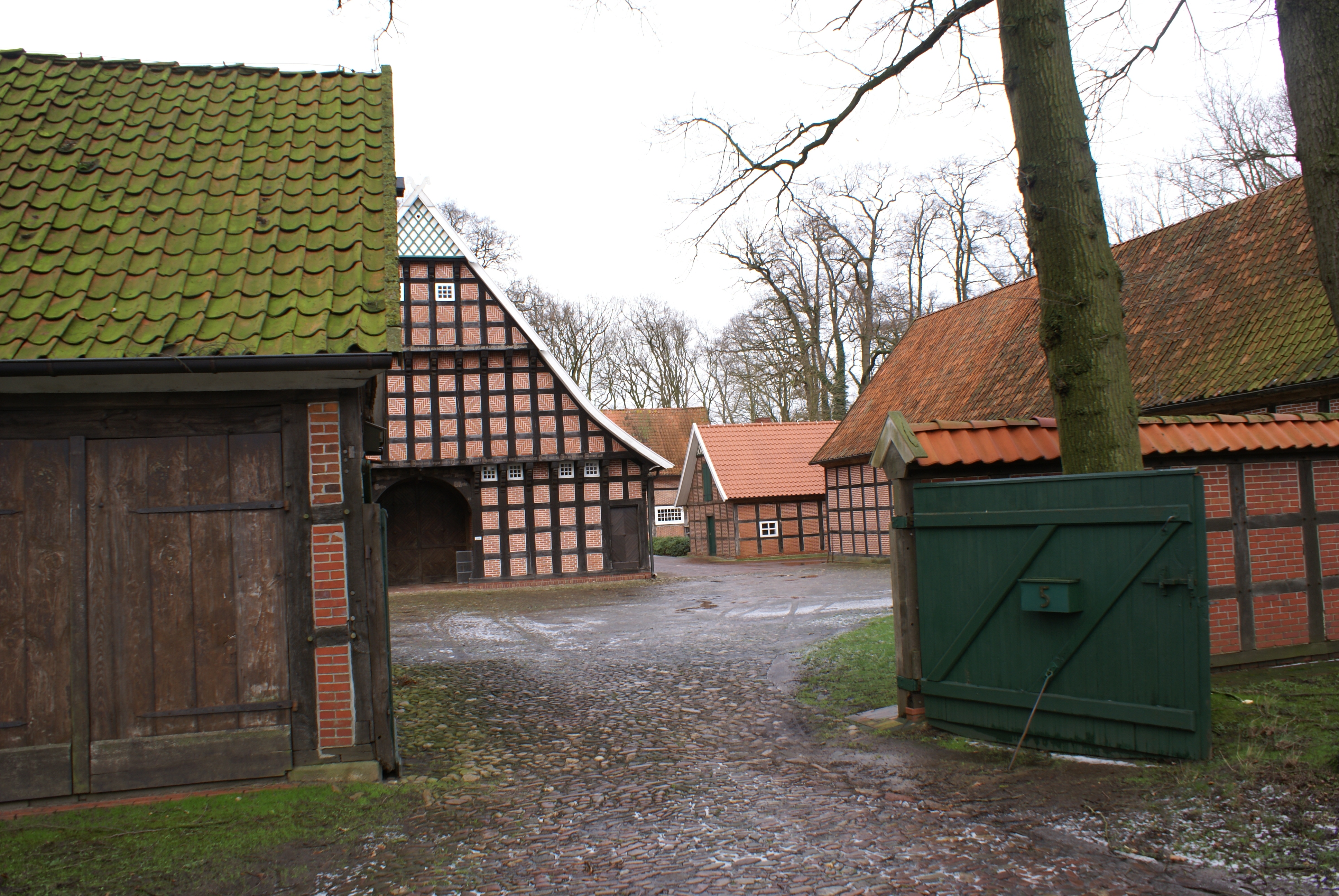 Artländer Bauernhof in Grönloh bei Badbergen